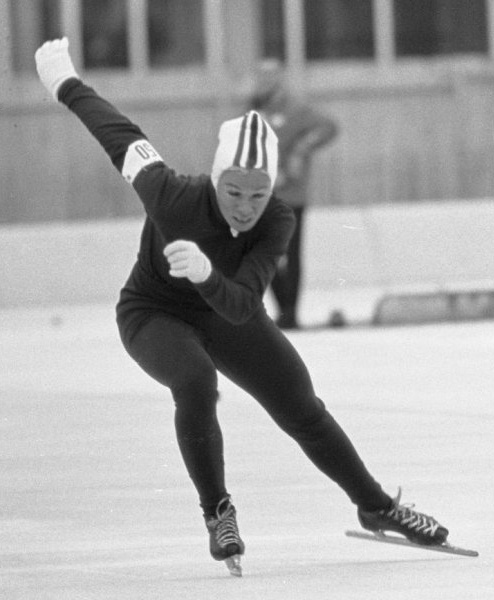 Tatyana Sidorova